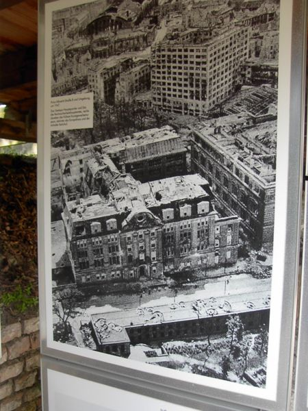 Gestapo Headquarter in Prinz-Albrecht-Strasse 8, Berlin(1945)